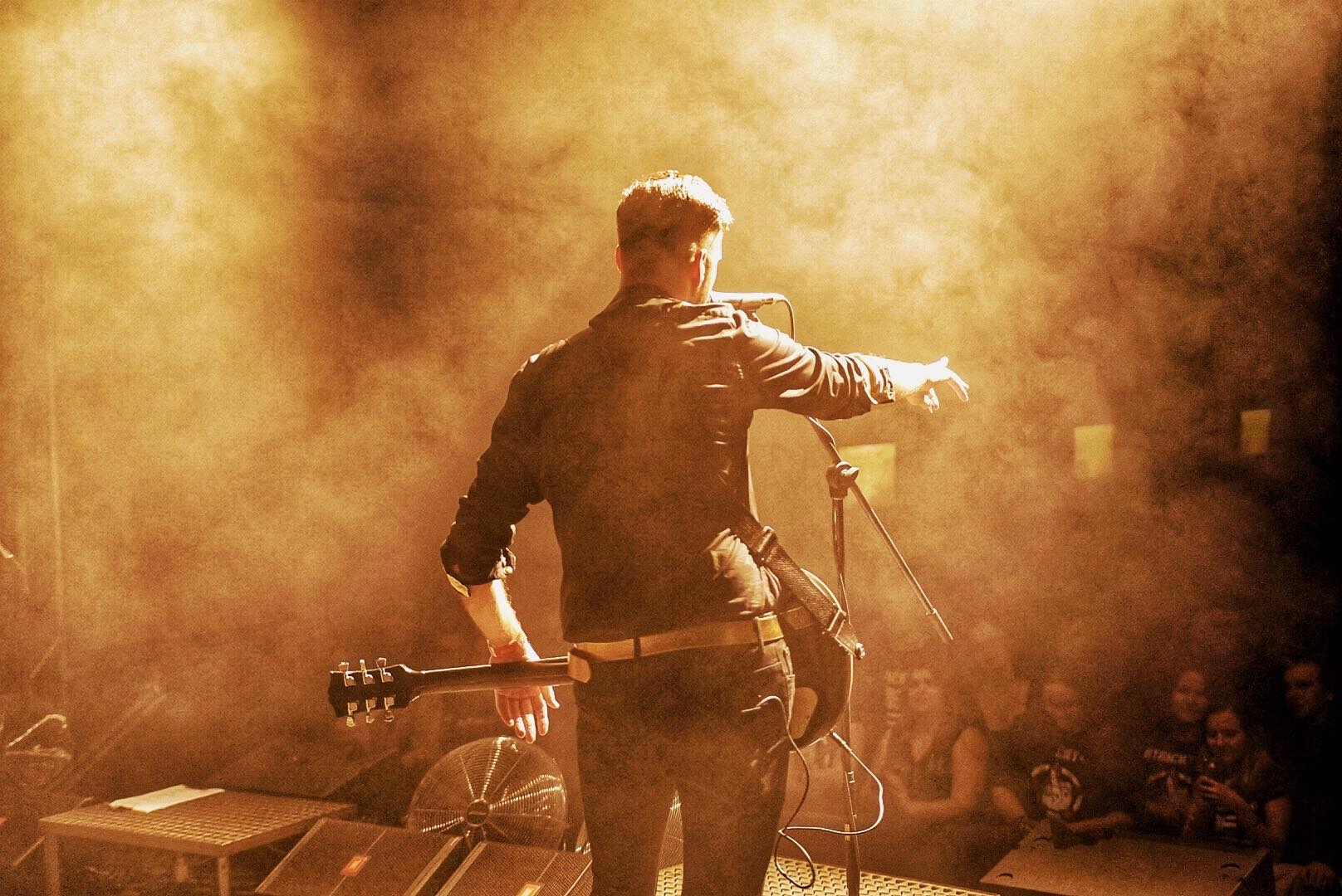 Mára - foto z koncertu